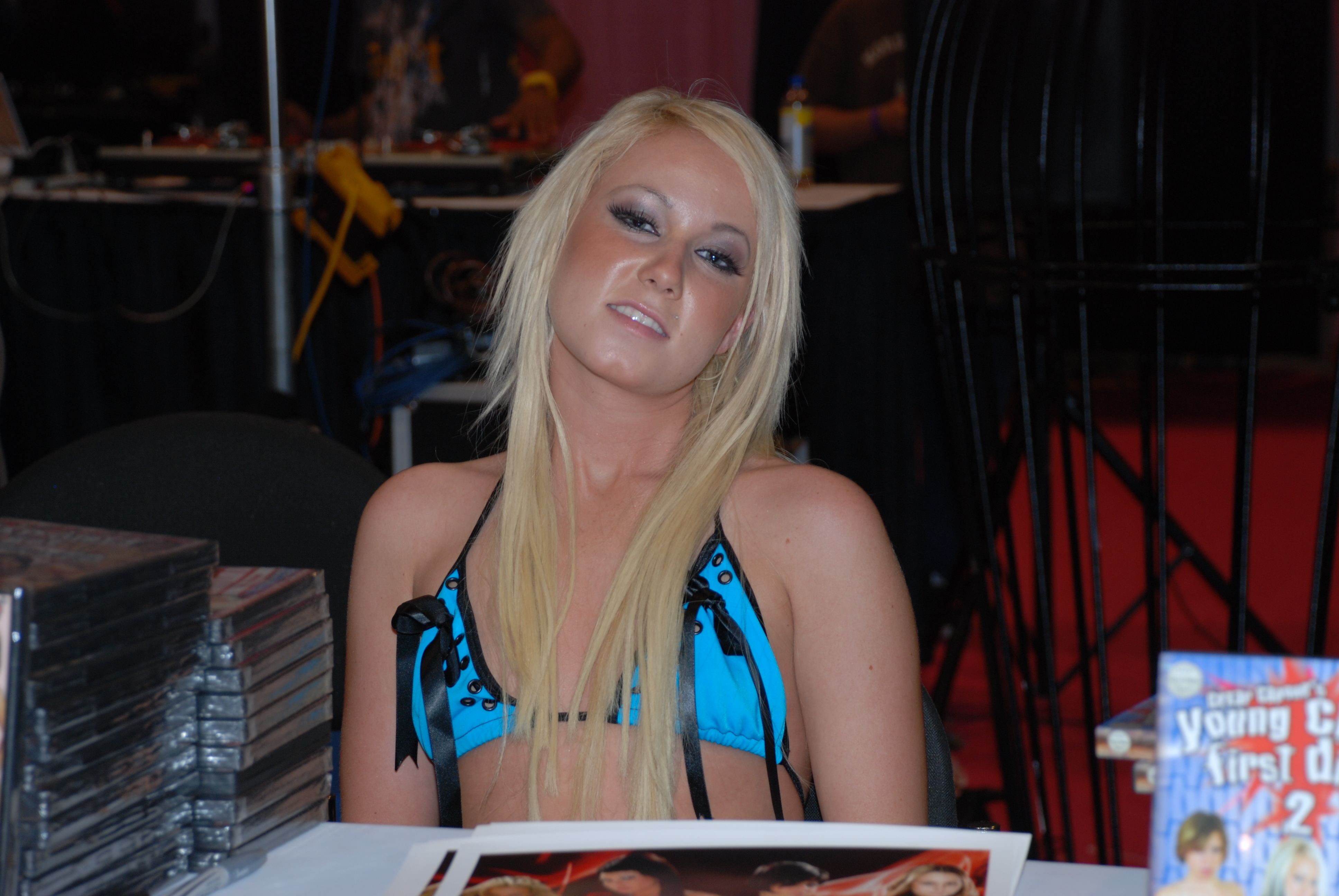 Miami Exxxotica 5-10-09 Nikon 109